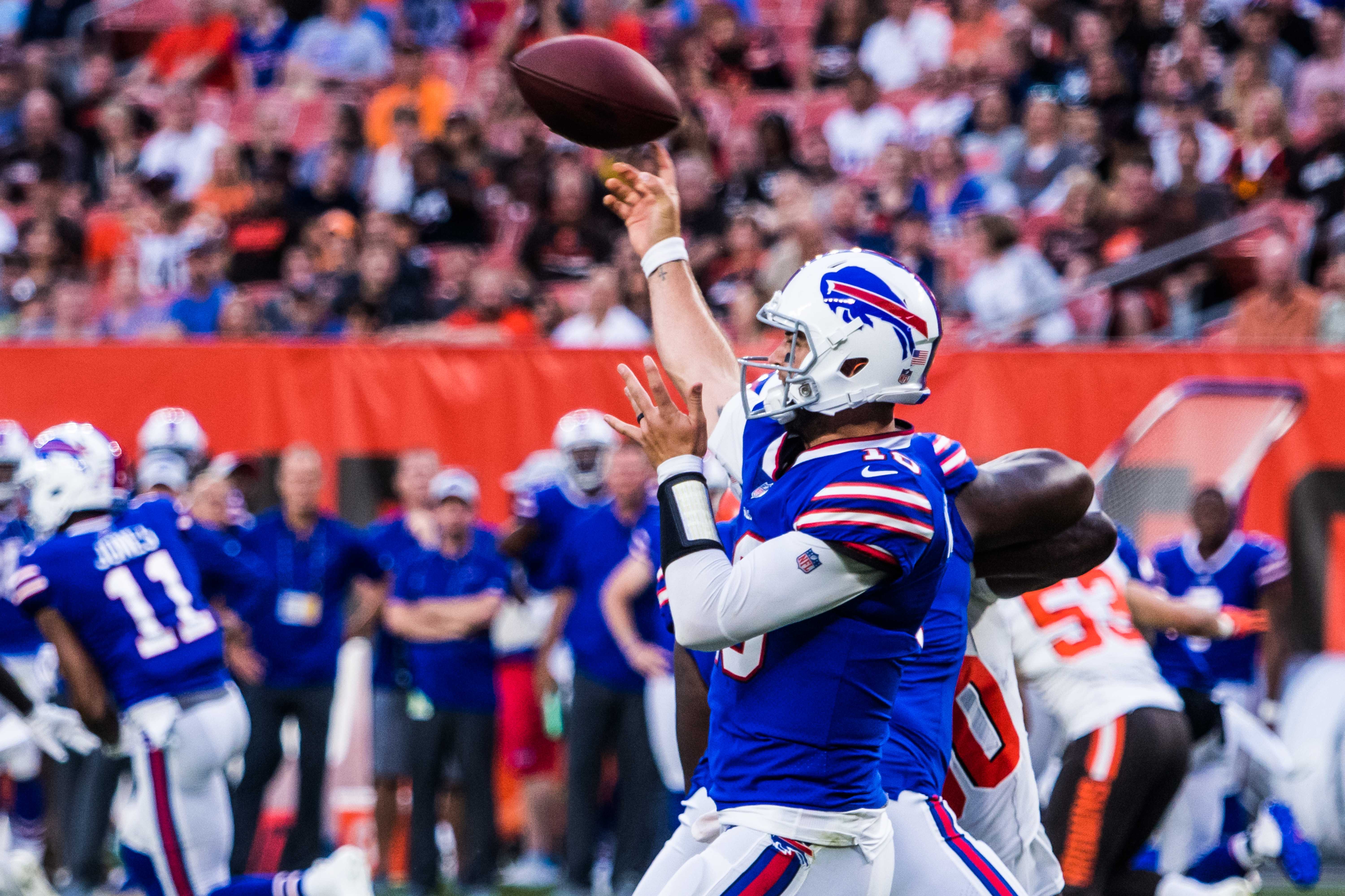 A.J. MaCarron